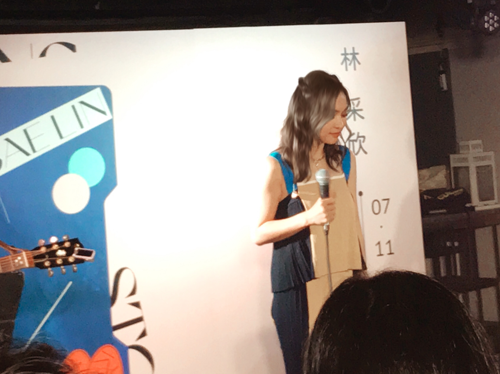 林采欣加盟華納唱片首場簽唱會於台北小地方展演空間舉行。